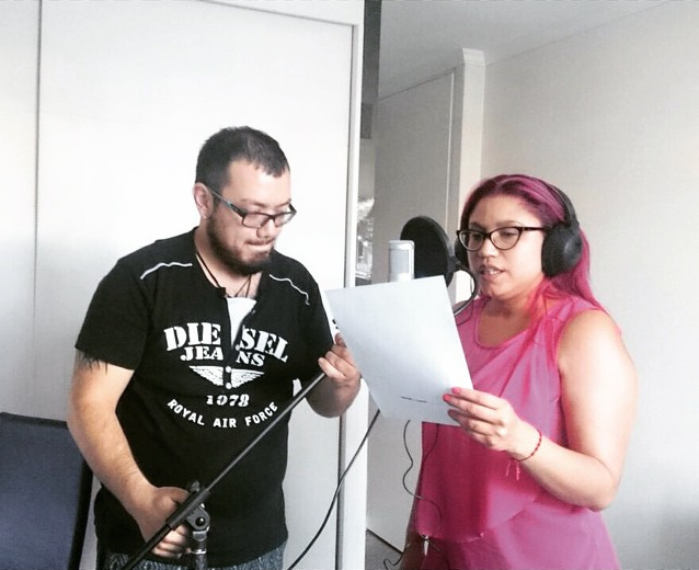 Grabando la voz de Alejandra Valle en mi estudio